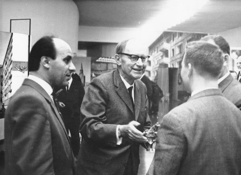 Berlin, Ausstellung sowjetische Architektur Zentralbild / Koard, 5.11.1965 Sowjetische Architektur-Ausstellung in Berlin eröffnet. Ein bedeutender Beitrag zu den Tagen der sowjetischen Kultur in der DDR ist die Architektur-Ausstellung, die am 5.11.1965 im Zentralen Klub der Jugend und Sportler in der Berliner Karl-Marx-Allee eröffnet wurde. Zu den Gästen, die an den Eröffnungsfeierlichkeiten teilnahmen, gehörte auch Prof. Dr. Hans Schmidt (2.v.l.), Chefarchitekt im Institut für Städtebau und Architektur der Deutschen Bauakademie, der sich hier mit dem Chefredakteur der Zeitschrift "Deutsche Architektur", Dr. Kreuz (vorn rechts), angeregt unterhält. Abgebildete Personen: Schmidt, Hans Prof. Dr.: Institut für Städtebau und Architektur der Deutschen Bauakademie, DDR